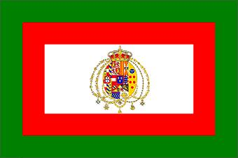 Bandiera del regno constituzionale delle due Sicilie 1848